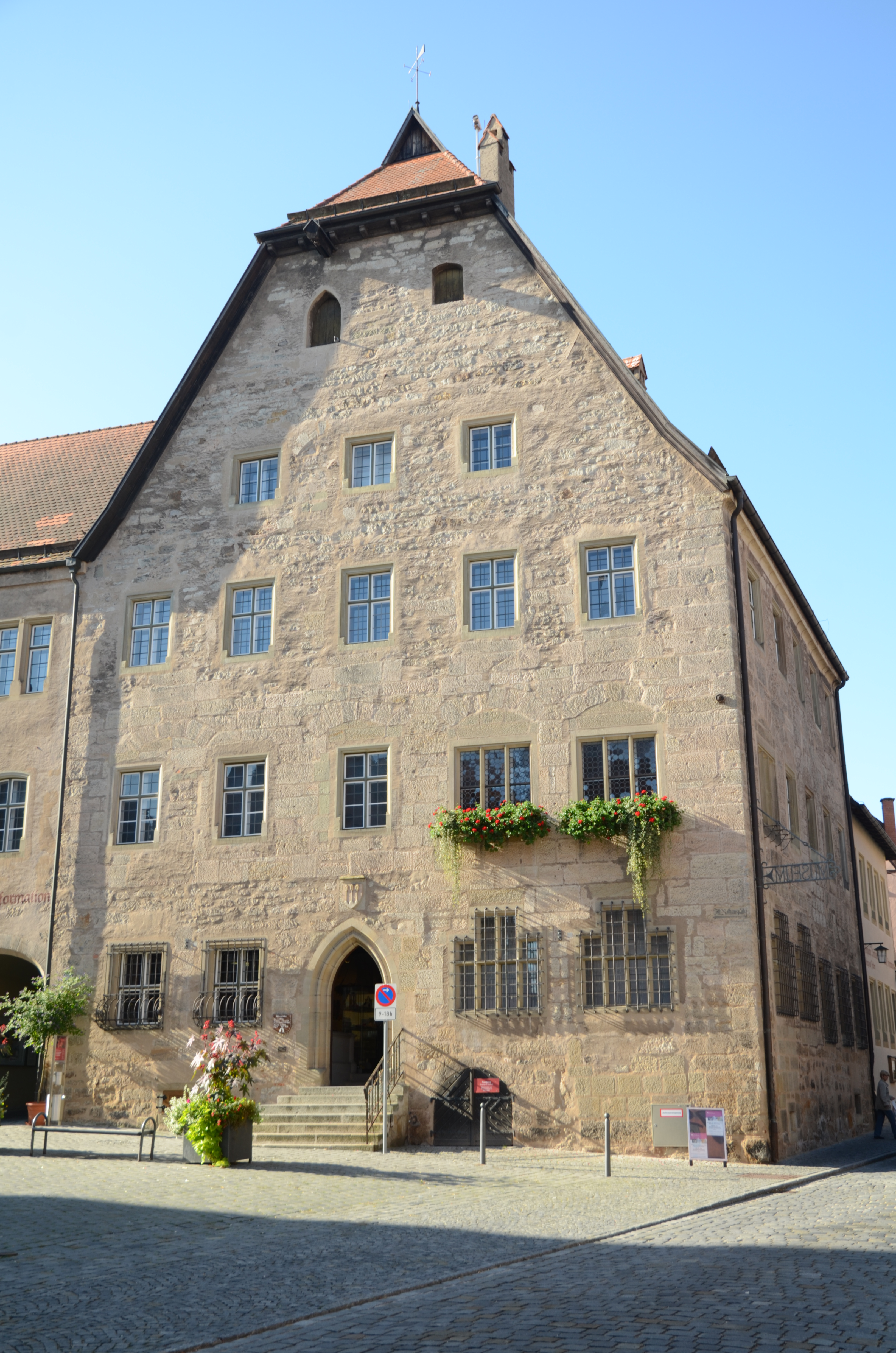 Dinkelsbühl, altes Rathaus